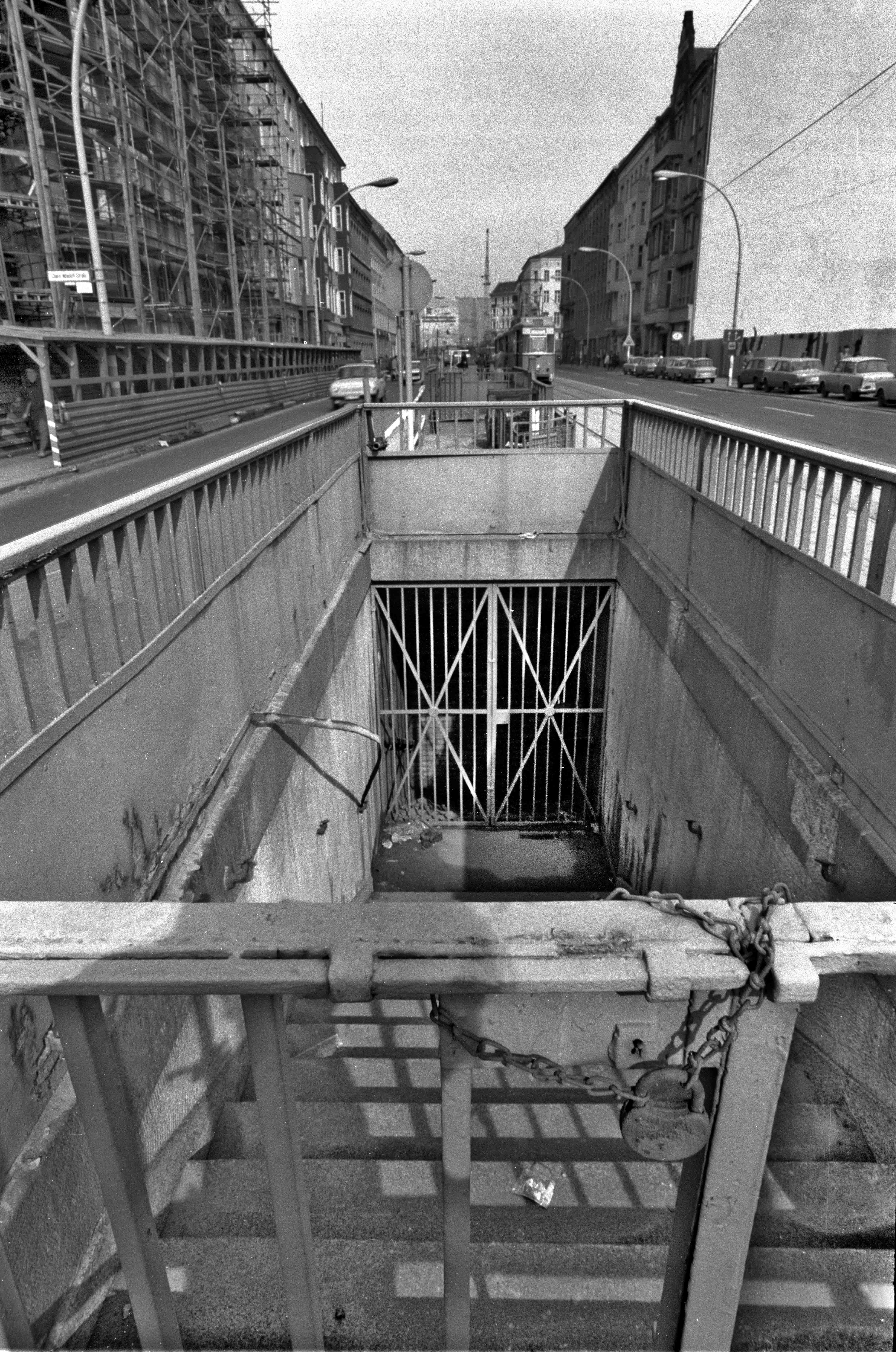 U-Bahneingang 27.03.1987